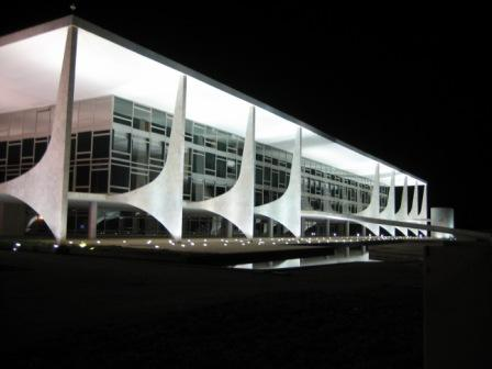 Palacio do Planalto — Por Oscar Niemeyer Esplanada dos Ministérios, Brasília.